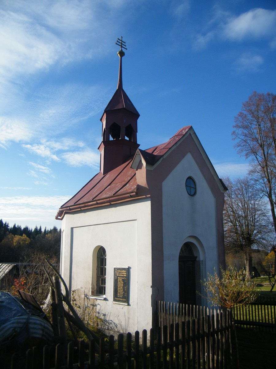 Kaple svatého Václava (2015)